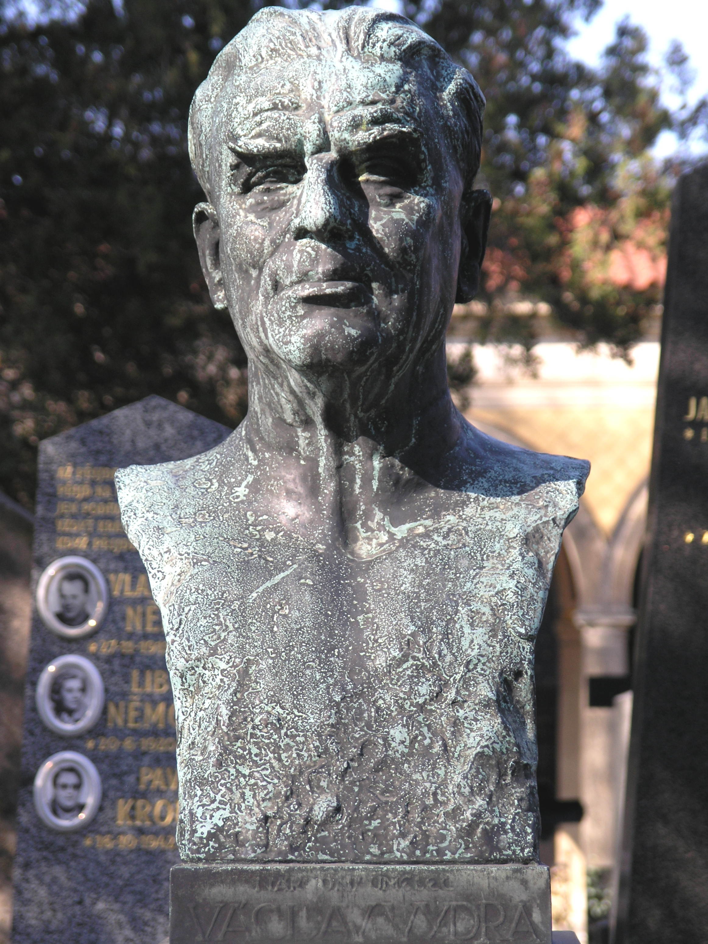 Vyšehradský hřbitov - Václav Vydra (1876-1953)